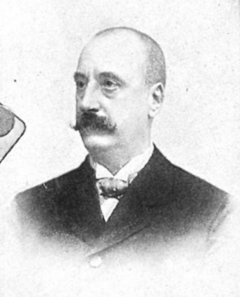 Sr. D. Sebastián Torres. Presidente de la Liga para la Defensa Industrial y Comercial